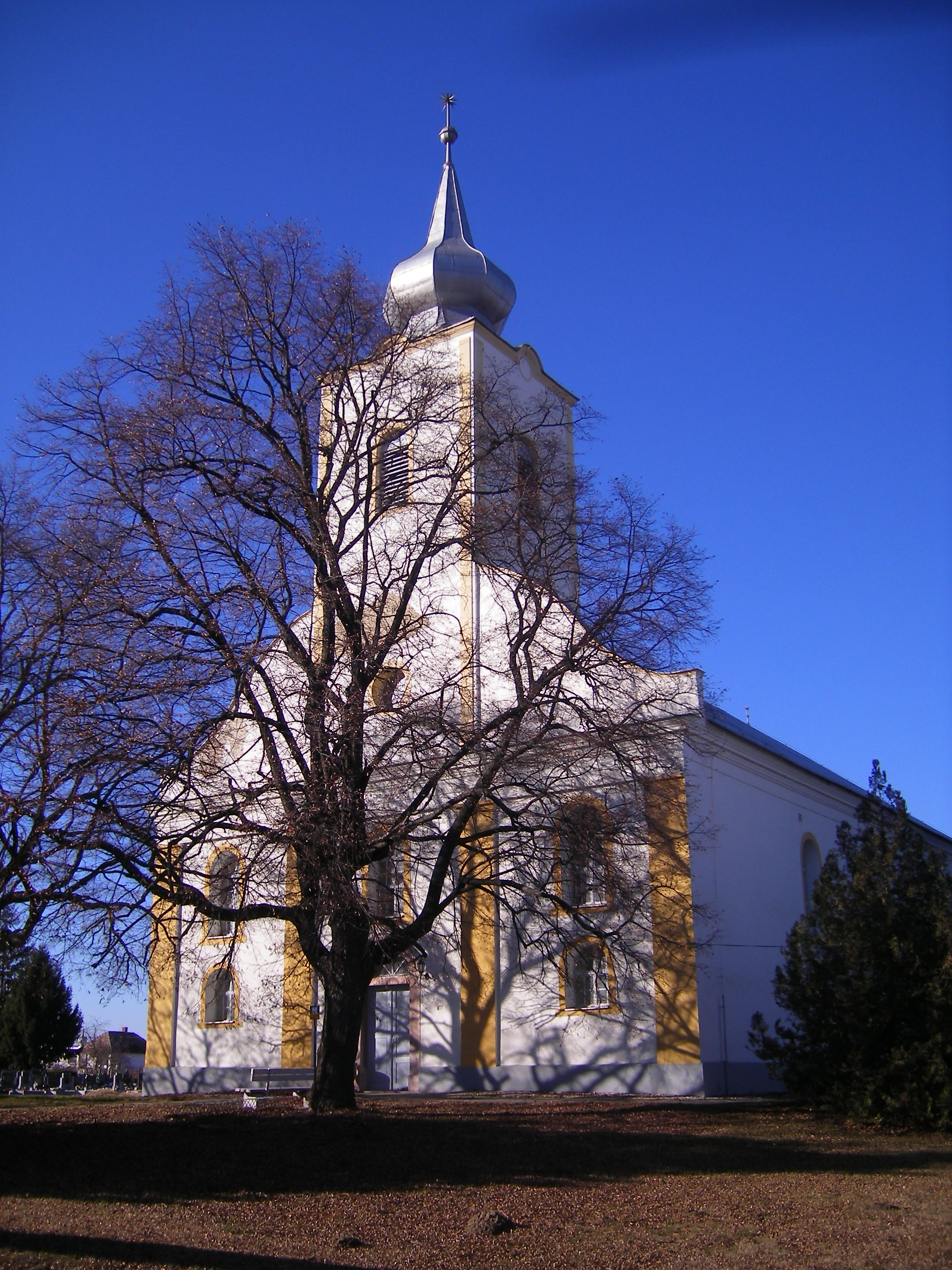 Dunamocs - református templom